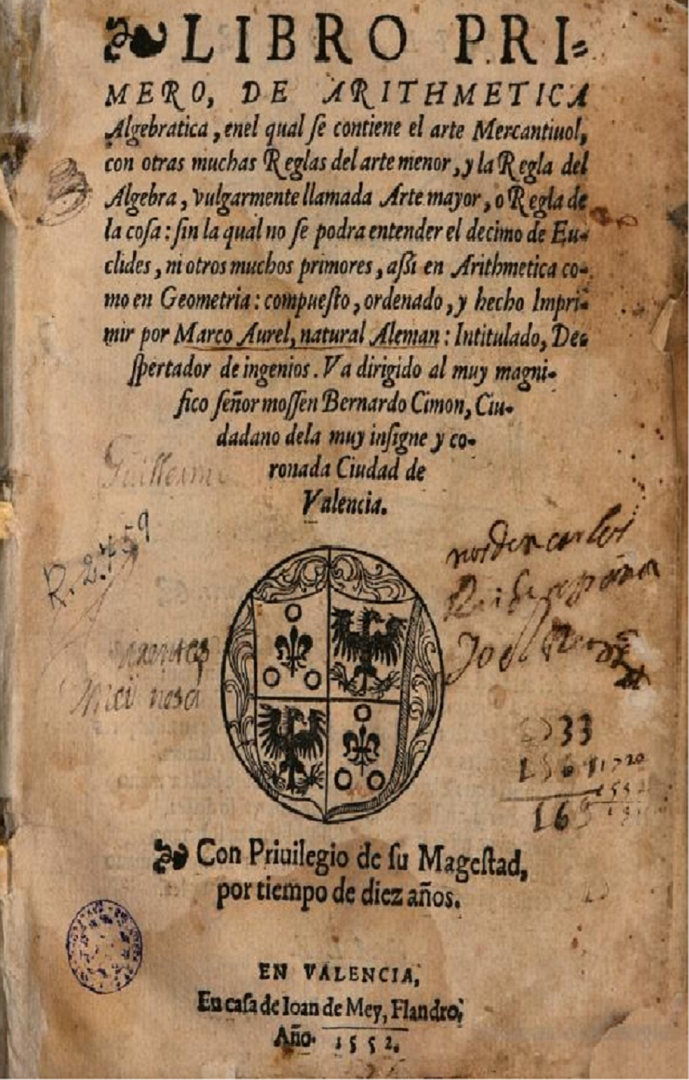 Portada de l'obra "Libro primero de arithmetica algebratica" de Marco Aurel. En Valencia : en casa de Ioan de Mey Flandro, 1552.